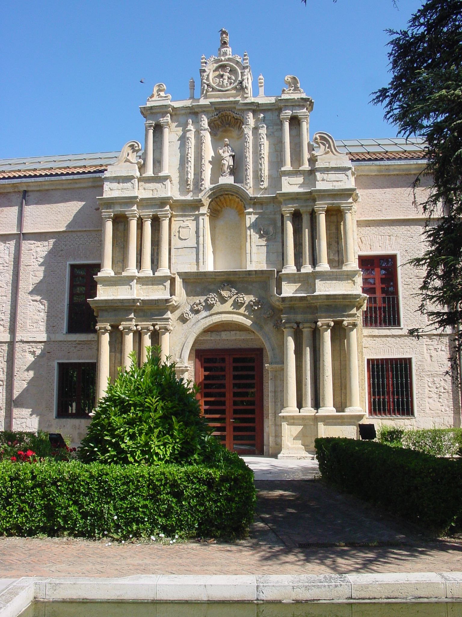 Portada trasladada al Colegio de Santa Cruz desde el desaparecido Colegio de San Ambrosio. El colegio de San Ambrosio fue una institución fundada por la Compañía de Jesús en Valladolid (comunidad de Castilla y León, España).